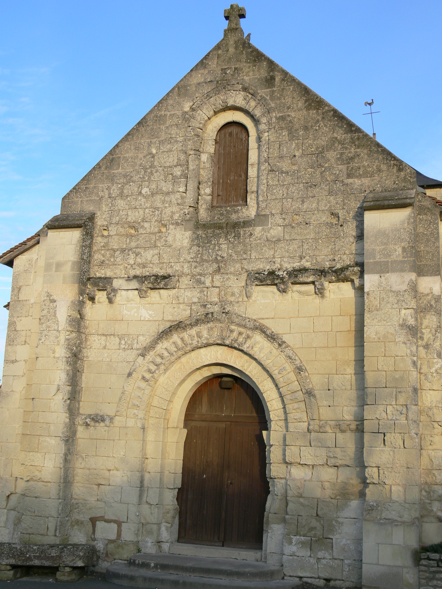 façade de l'église Notre-Dame